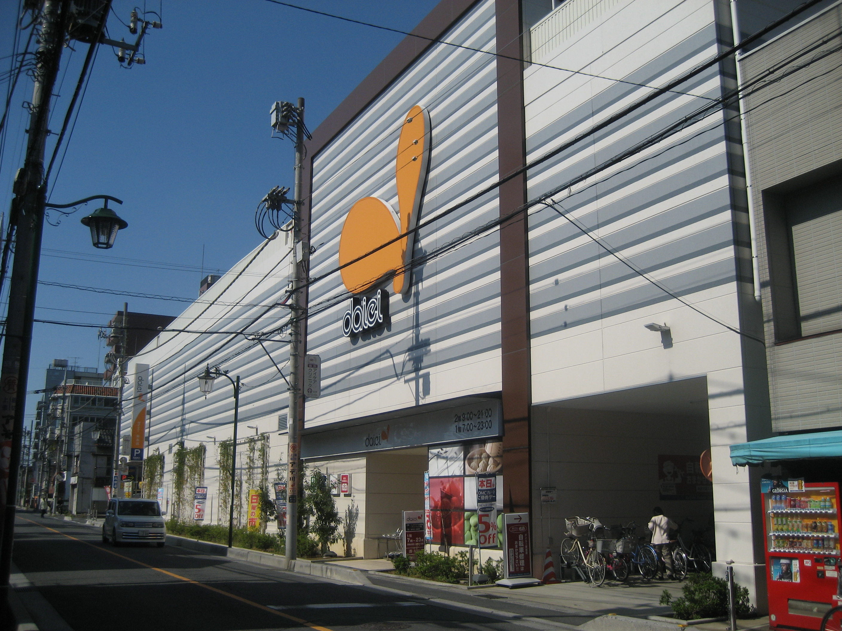 埼玉県草加市にあるダイエー草加店店舗（南側を撮影）